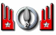 Mostrine e fregio attuali di Piemonte Cavalleria